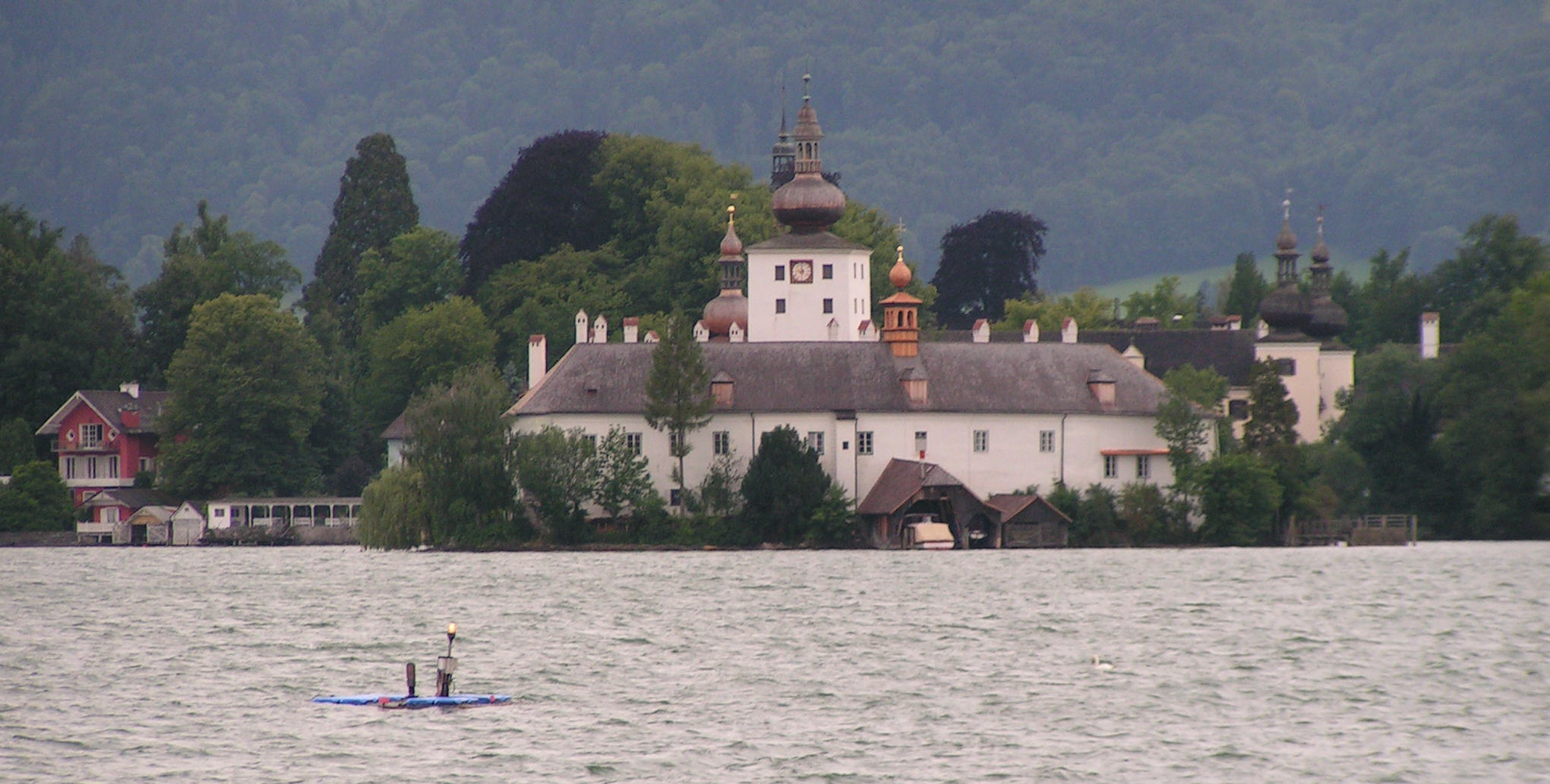 Seeschloss und Landschloss Ort, vom Traunsee aus betrachtet